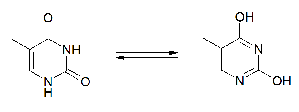 Tautomeriegleichgewicht von Thymin